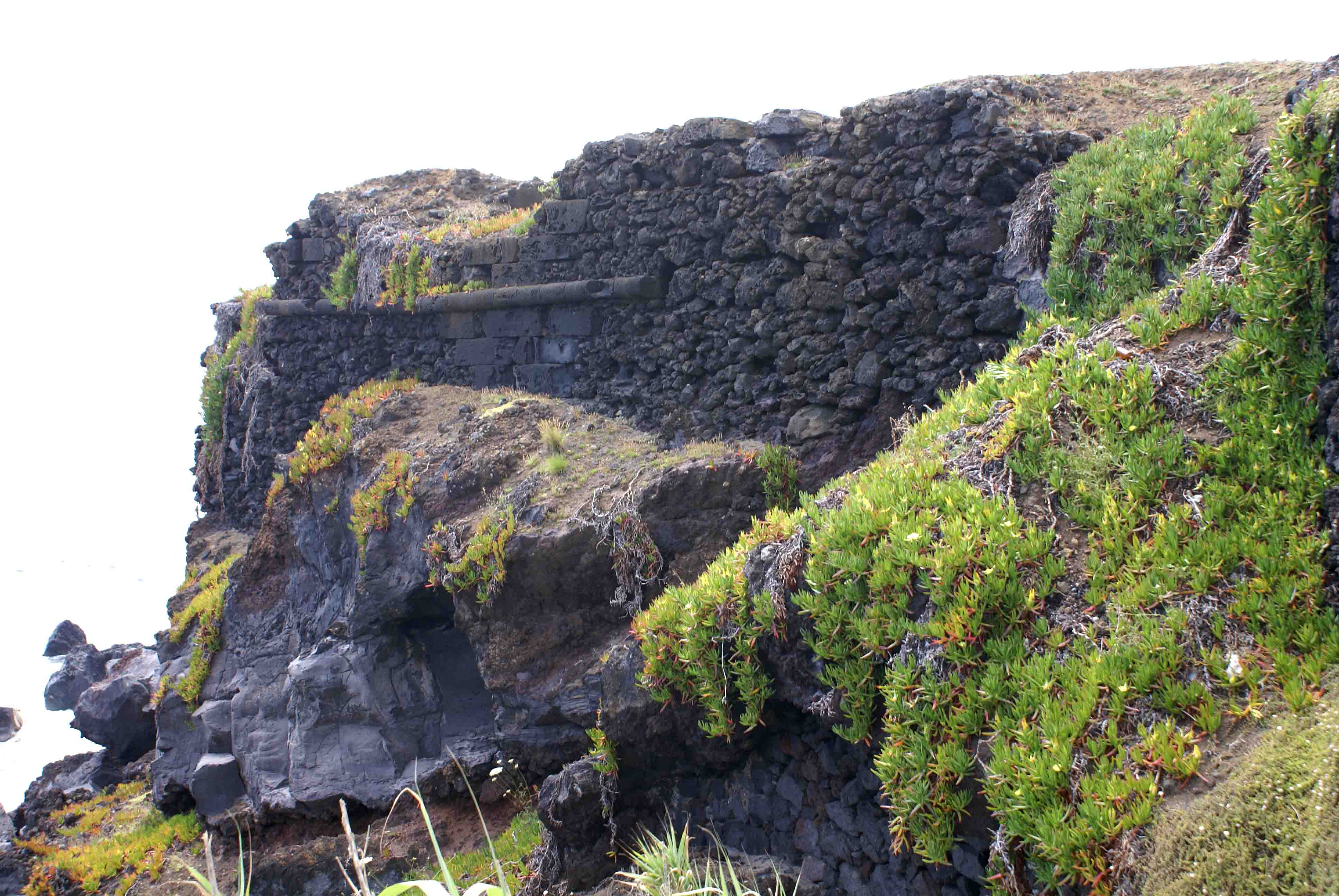 Forte do Porto das Cinco Ribeiras, lado Nascente, freguesia das Cinco Ribeiras, Angra do Heroísmo, ilha Terceira, Açores, Portugal.